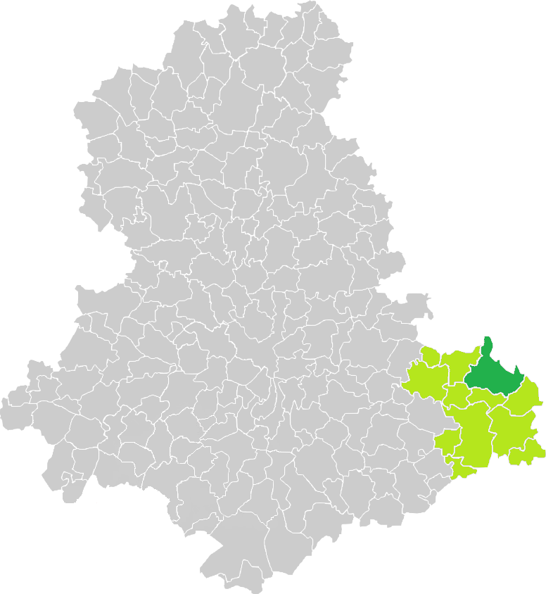 Carte de situation de la commune de Peyrat-le-Château (en vert foncé) dans le votre Canton (en vert clair) sur une carte des communes de la Haute-Vienne